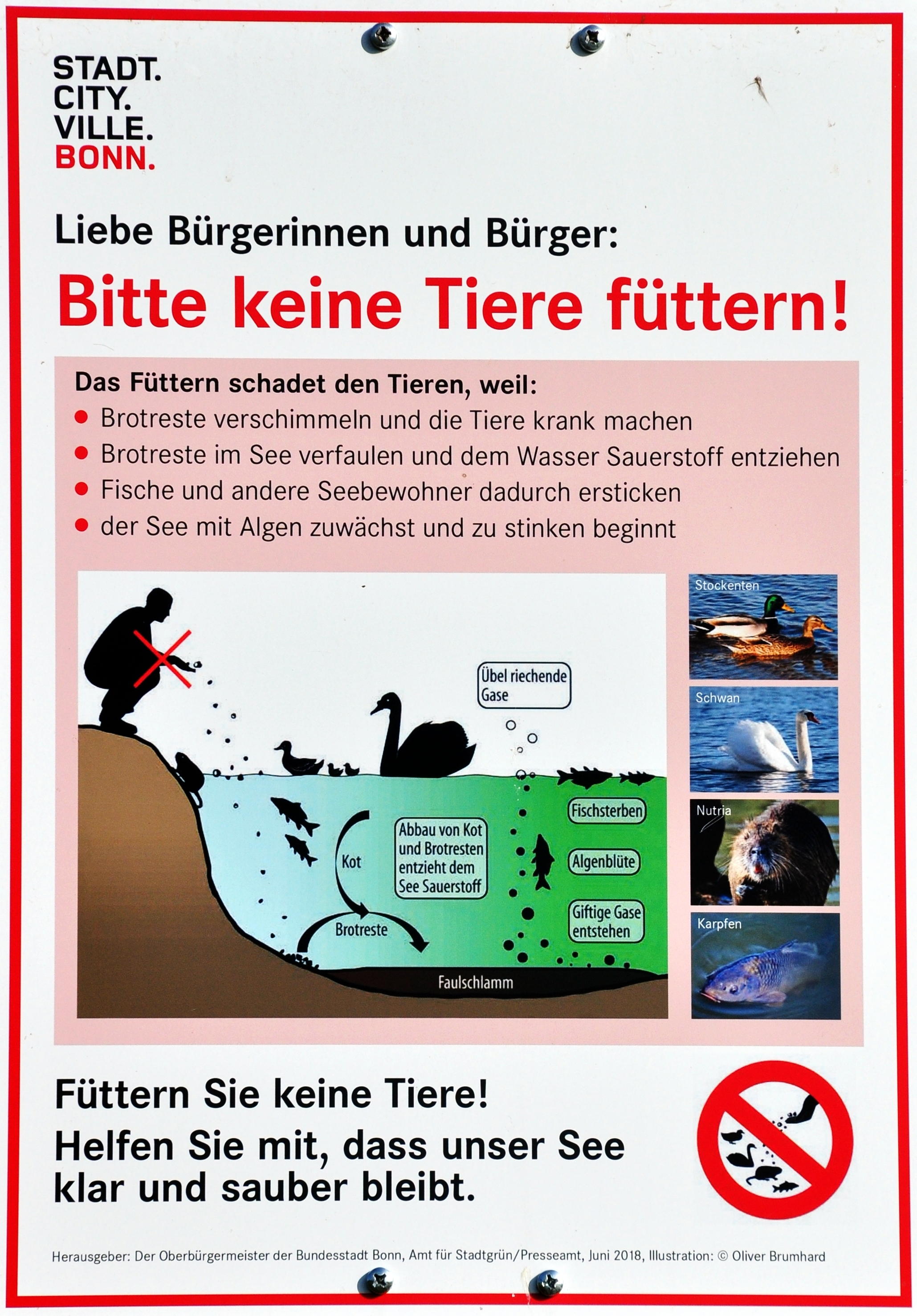 Infotafel am Bonner Rheinauensee – Bitte keine Tiere füttern